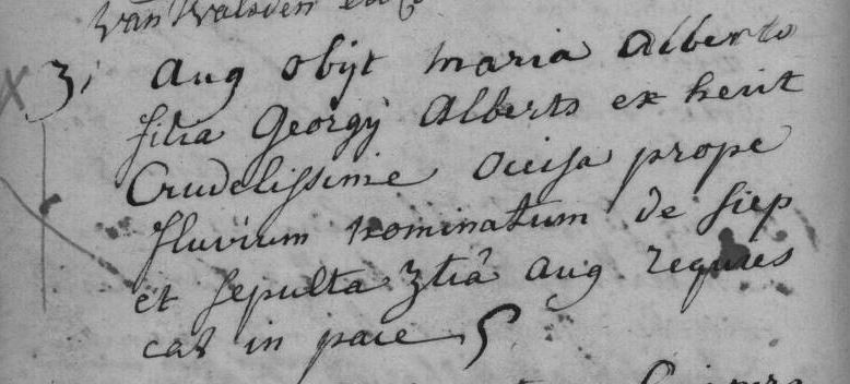 Overlijdensakte van Maria Alberts in het parochieregister van de parochie Boorsem. In die tijd hoorde Kotem en Boorsem tot één parochie. Ter ere van haar werd 'Mariekes Kruuske' opgericht in Kotem. Het overlijdensbericht vermeldt foutief 31 augustus, terwijl de moord op 31 juli plaatsvond. In het overlijdensbericht zelf wordt ook vermeld dat de begrafenis al op 3 augustus plaatsvond. Tekst: 31 aug obiit maria alberts filia gergij alberts ex heut crudelissime occisa prope fluvium nominatum de siep et sepulta 3tia aug requies- cat in pace Vertaling: Op 31 juli (niet augustus) overleed Maria Alberts, dochter van Georges Alberts van op ’t Geneuth, op zeer gruwelijke wijze vermoord nabij de beek die men de Ziep noemt en begraven op 3 augustus. Moge ze rusten in vrede.